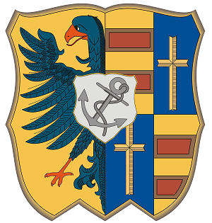 Wappen der Stadt Nordenham